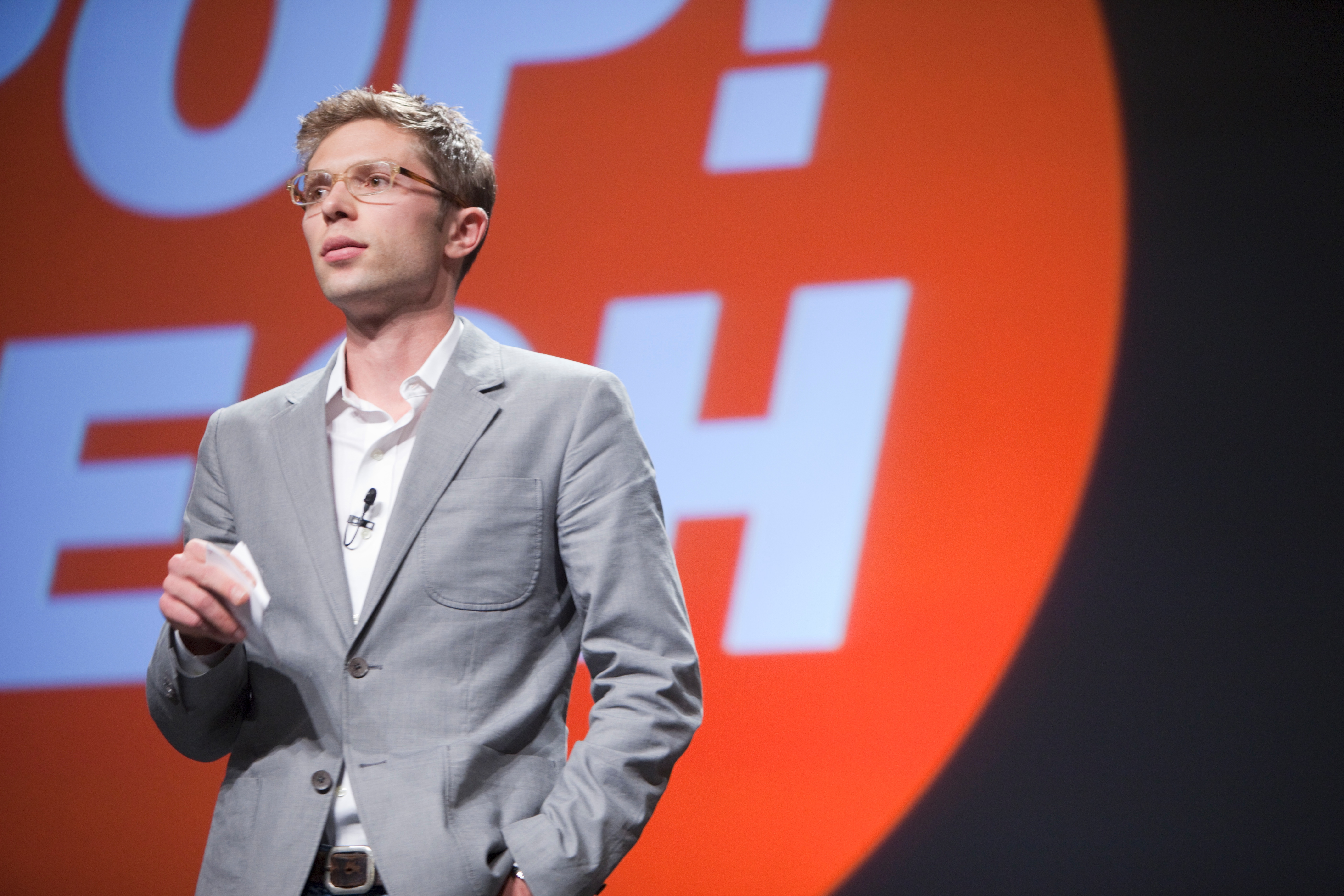 Jonah Lehrer talking at Pop!Tech 2009